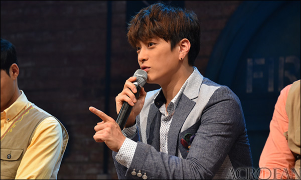 뮤지컬 '구텐버그' 프레스콜